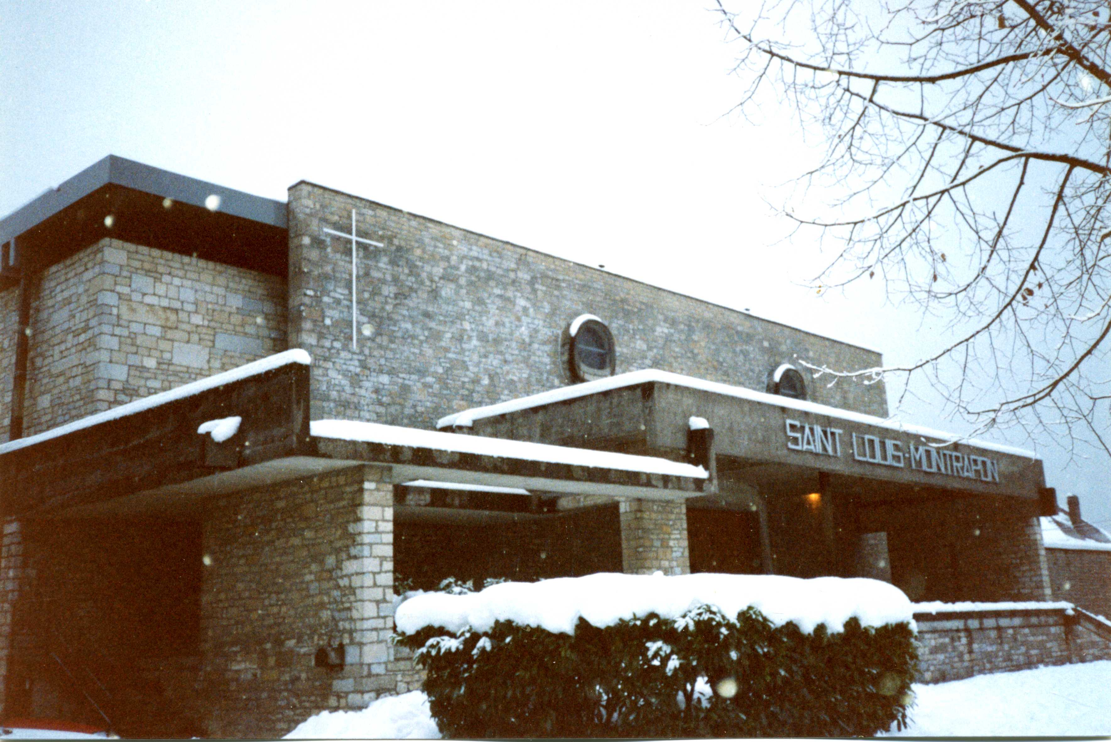 Eglise Saint-Louis, Besançon. Vitraux de Jean Le Moal